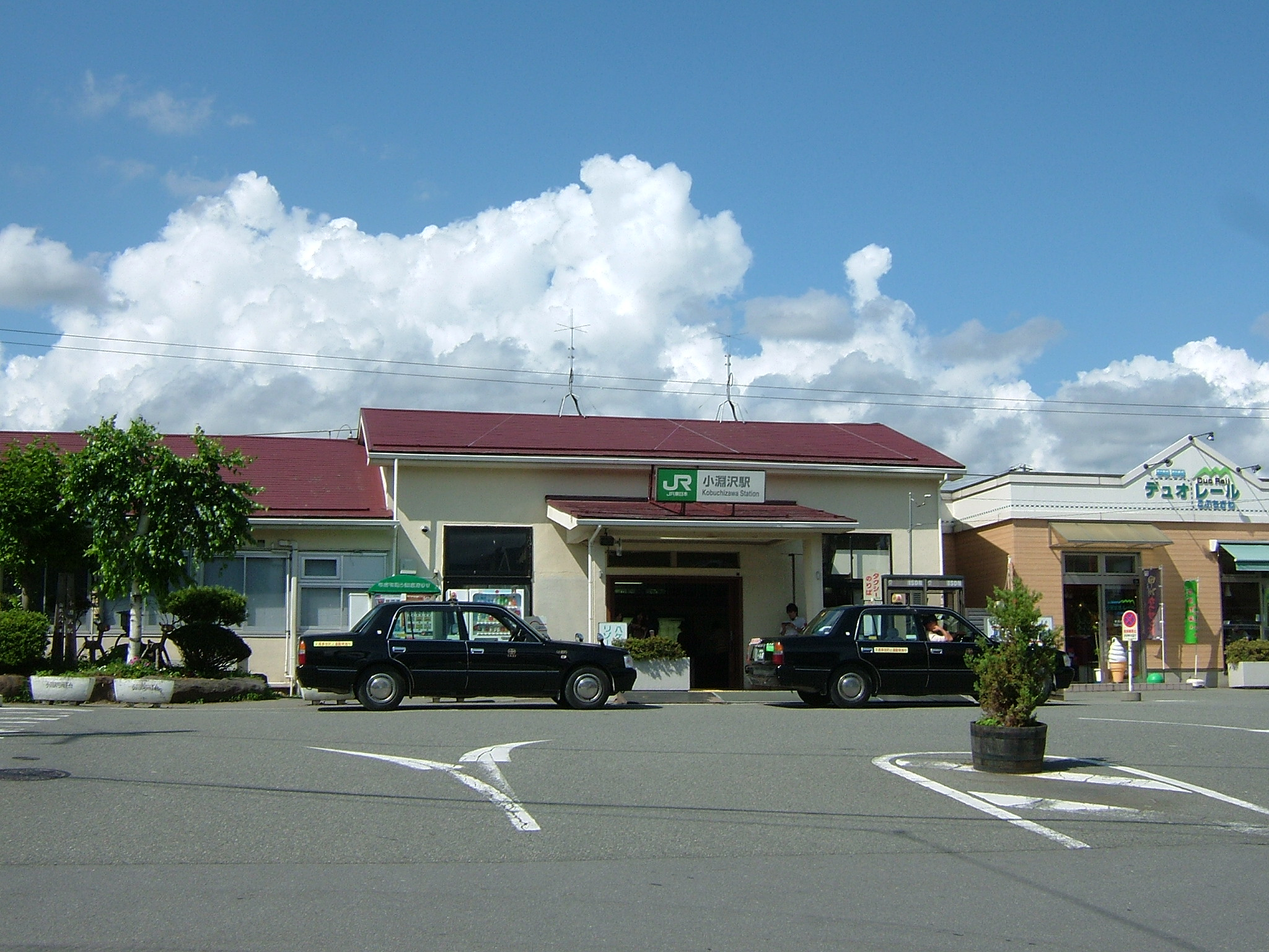 中央本線、小海線 小淵沢駅駅舎